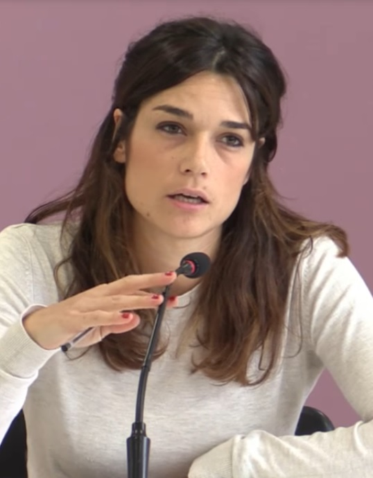 Clara Serra.